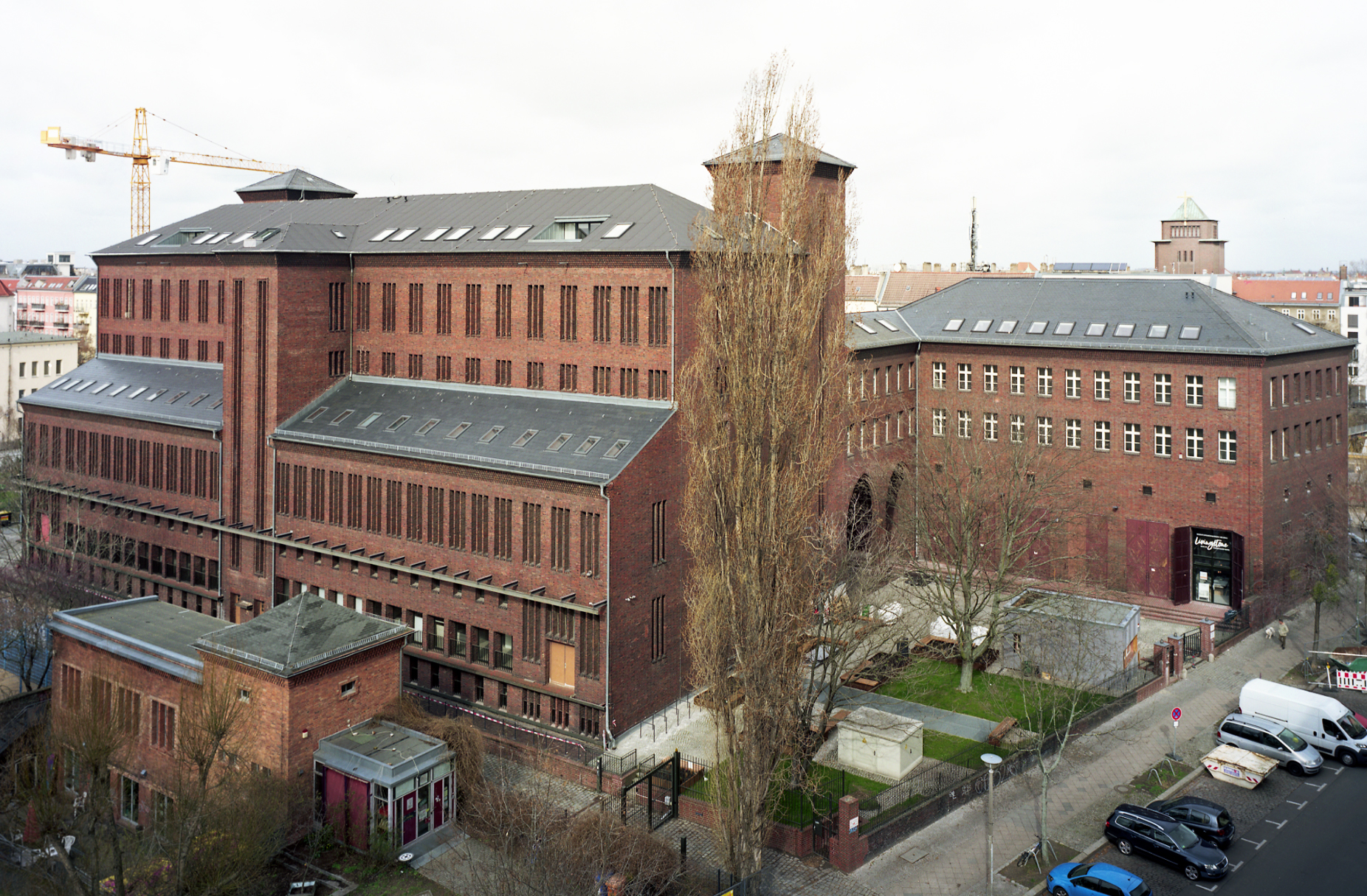 Umspannwerk Humboldt, Ansicht von Südosten. Aufn. Frühjahr 2019.